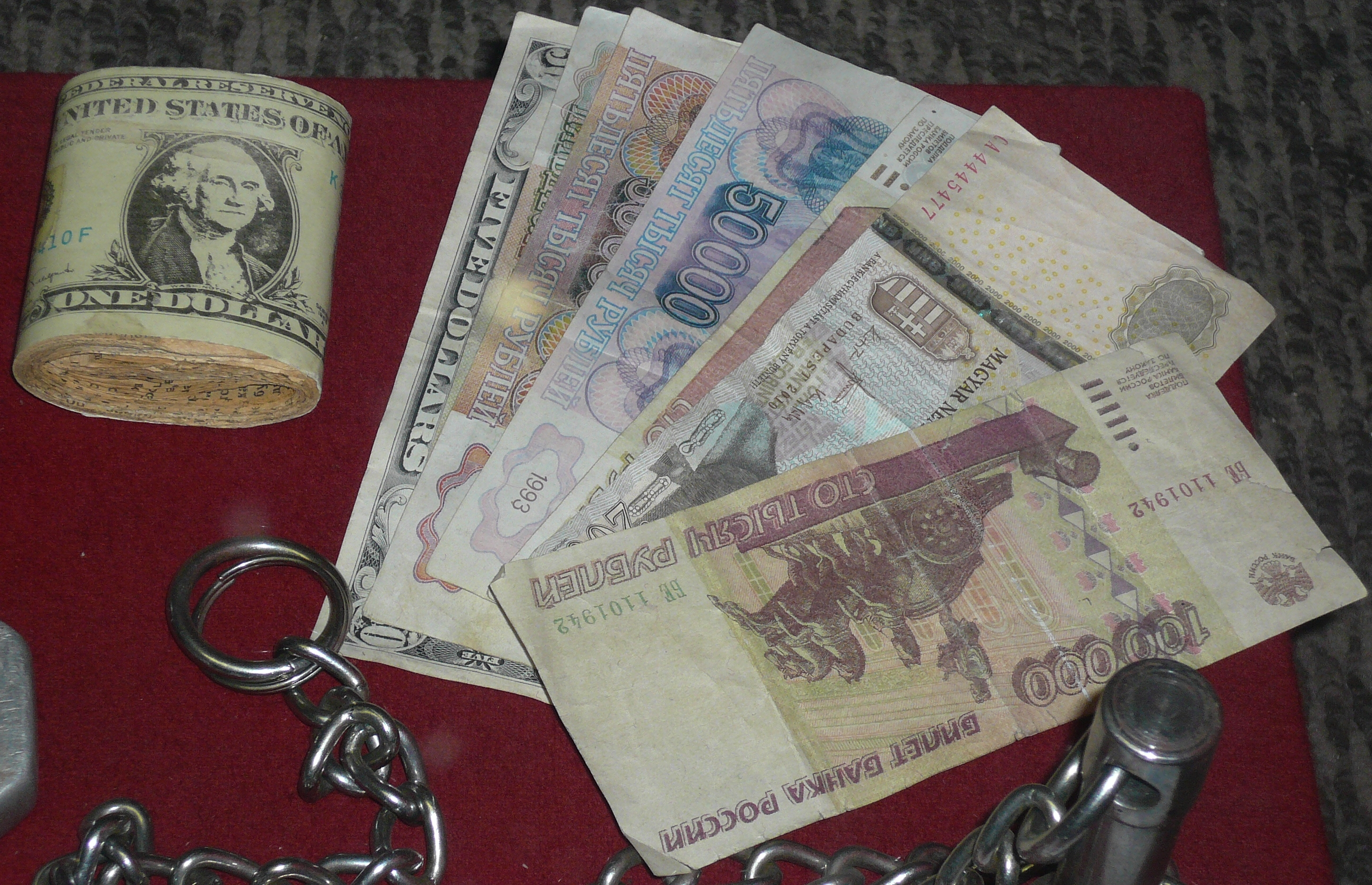 Фальшивые банкноты изъятые УВД Московского метрополитена. Народный музей московского метрополитена, Москва, Россия.